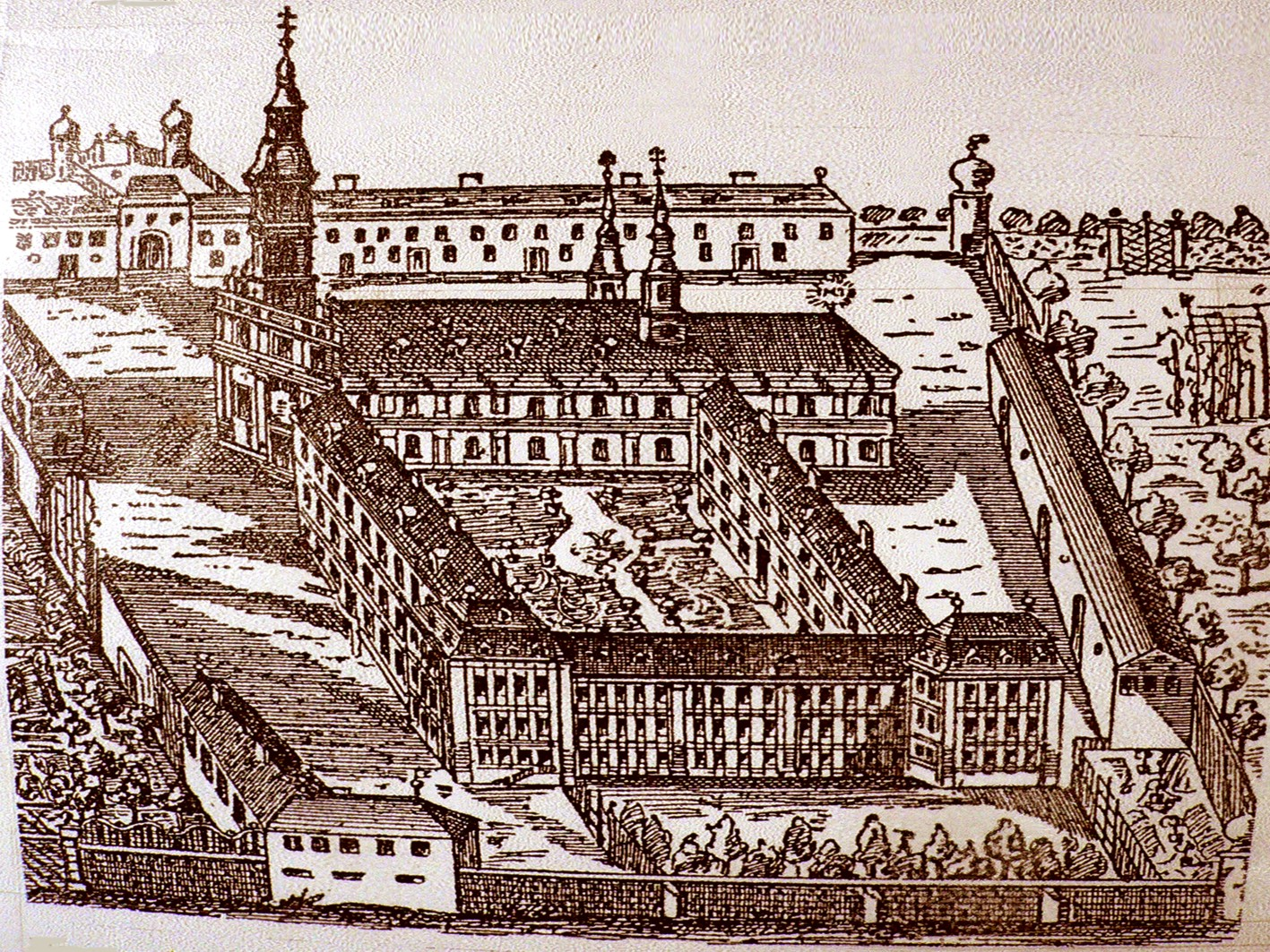 Alte Darstellung des Klosters Obertheres am Main noch mit Abteikirche (abgerissen). Im Vordergrund Marienkapelle